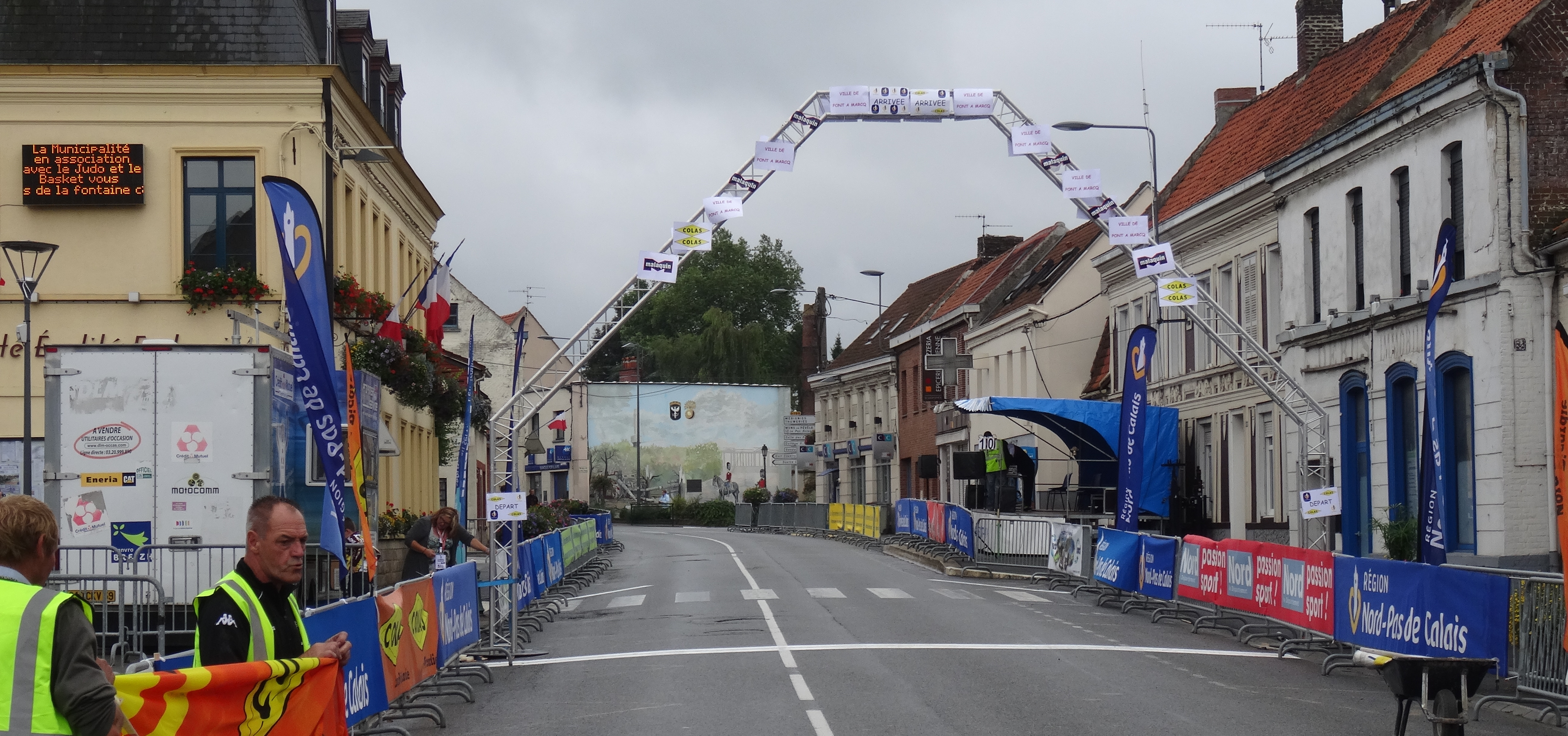 Reportage photographique réalisé le dimanche 13 juillet à l'occasion du départ et de l'arrivée de la Ronde pévéloise 2014 à Pont-à-Marcq, Nord-Pas-de-Calais, France.